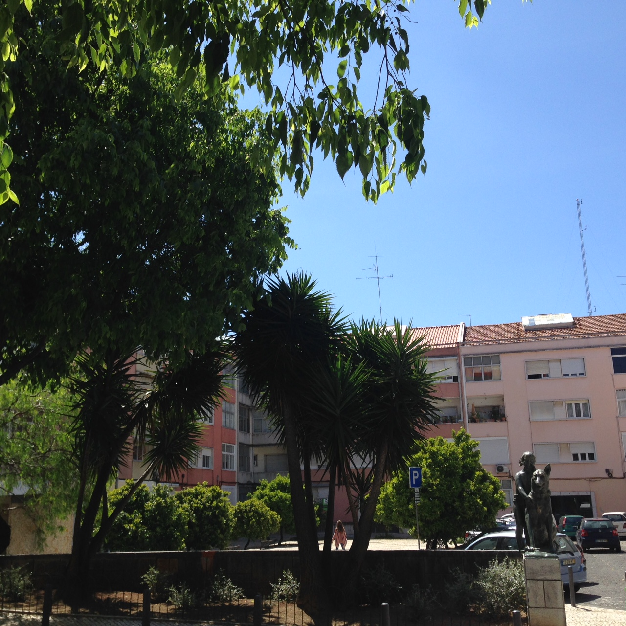 Jardim